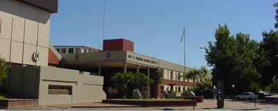 UTNfrente.jpg